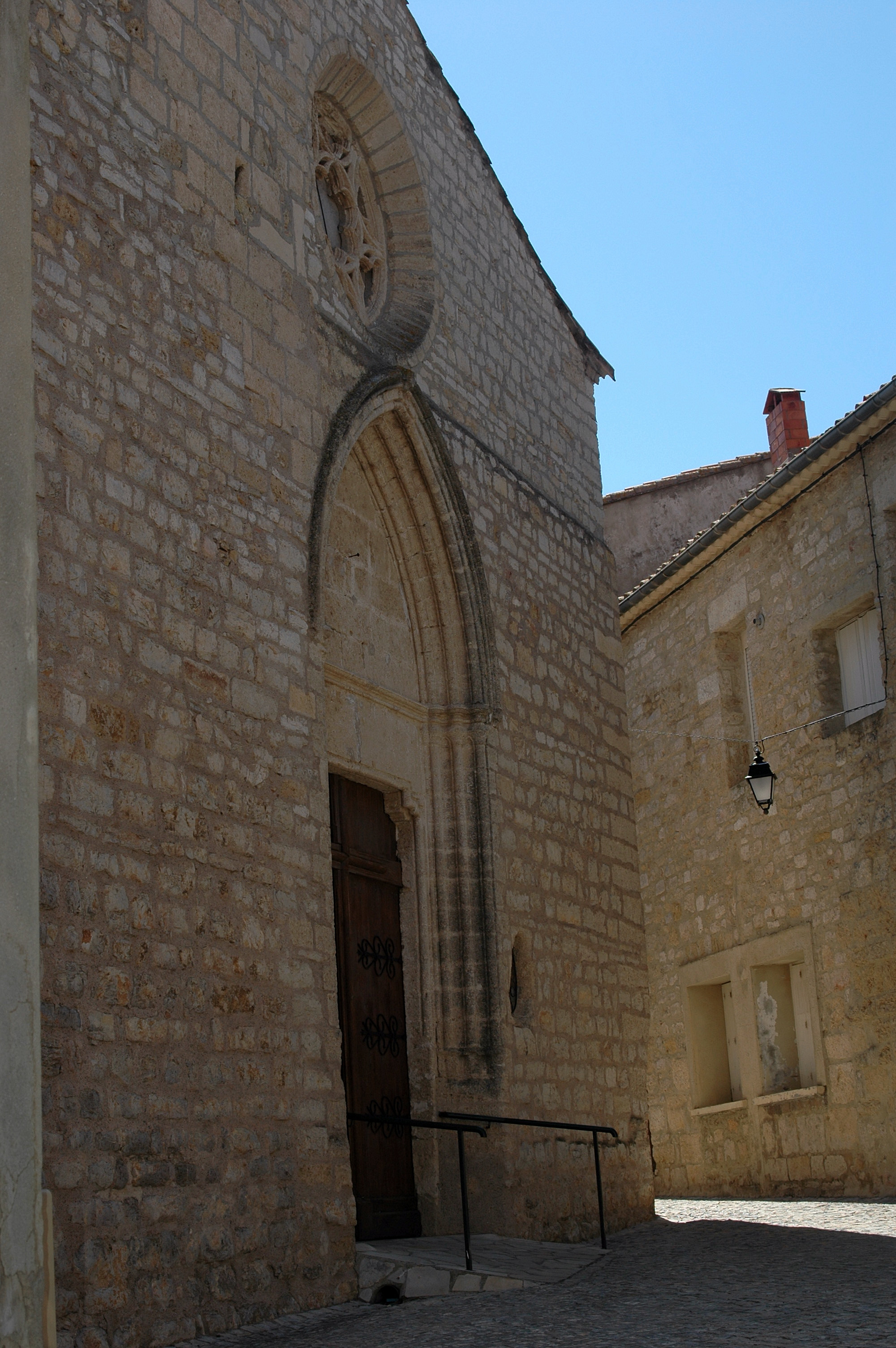 Balaruc-le-Vieux (Hérault), porche de l'église Saint-Maurice